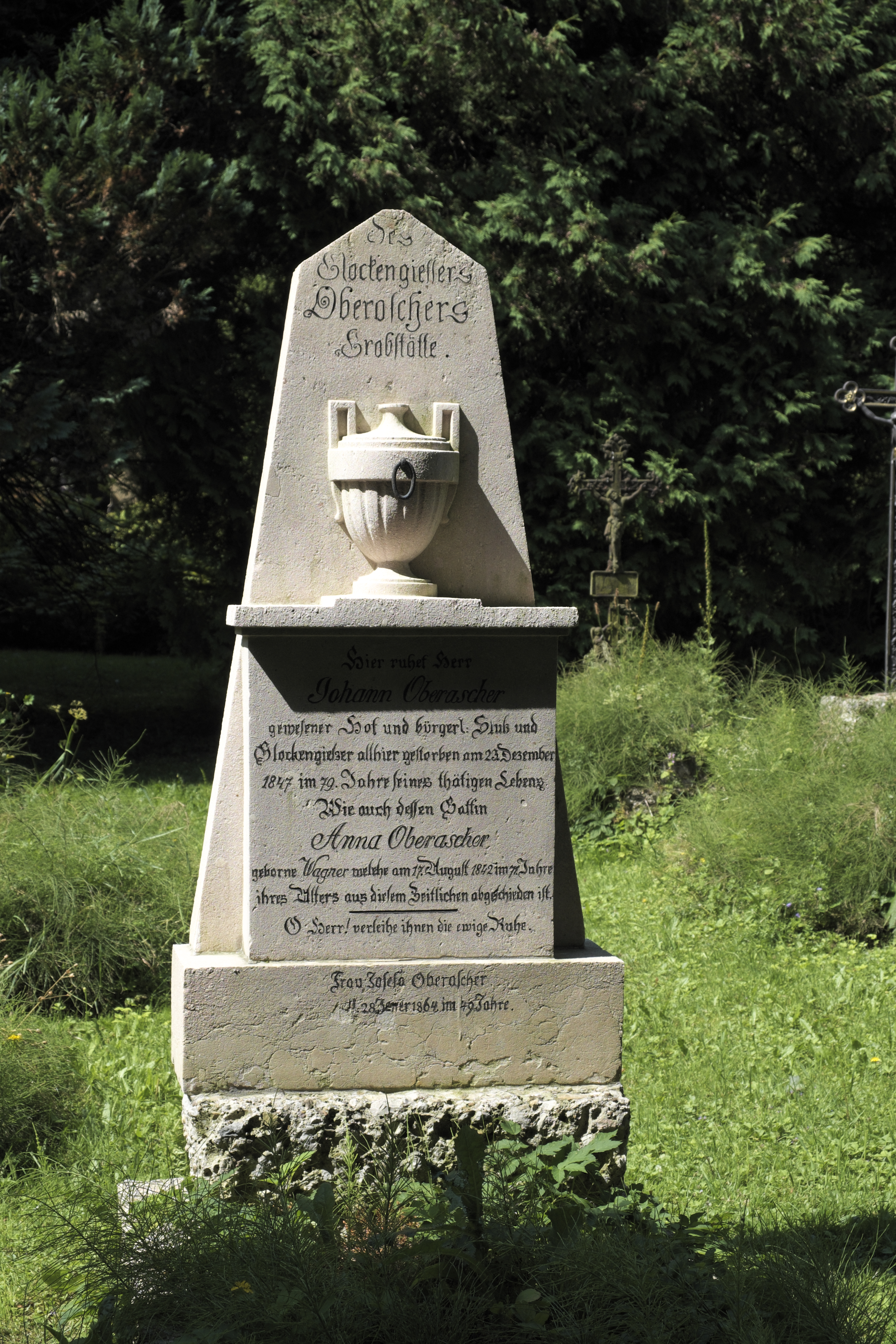 Grabstein auf dem Sebastiansfriedhof in Salzburg (Österreich)